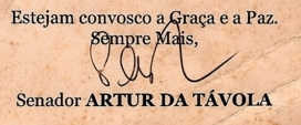 Assinatura do senador Artur da Távola.